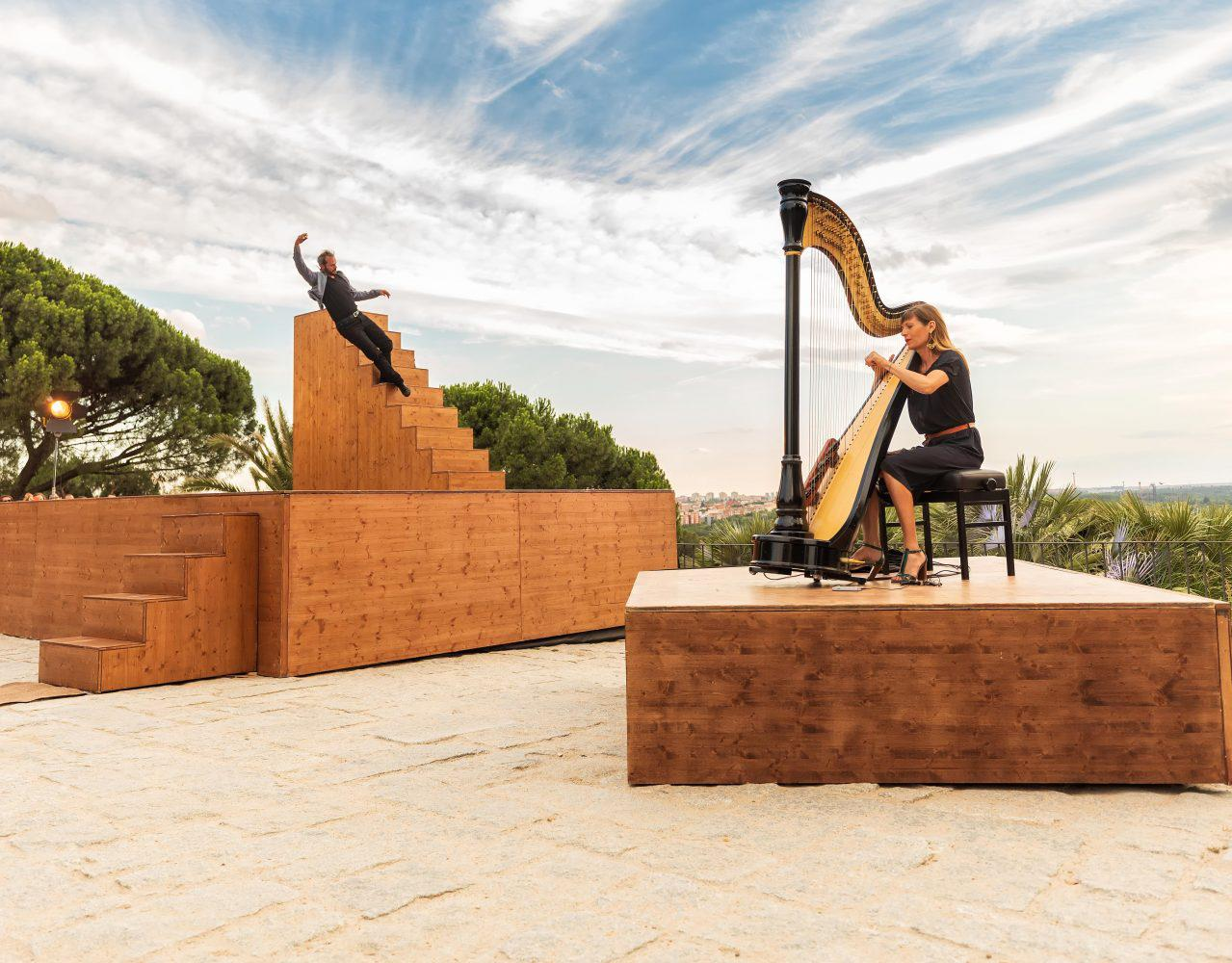 El artista y acróbata del aire Yoann Bourgeois mostró ayer Fugue/Trampoline, una breve e impactante pieza de 8 minutos de duración, que contó con cinco pases durante el largo atardecer del mirador del Templo de Debod, y cuya exhibición se repite esta tarde, con nuevos pases entre las 20.30 y las 23.30 horas.